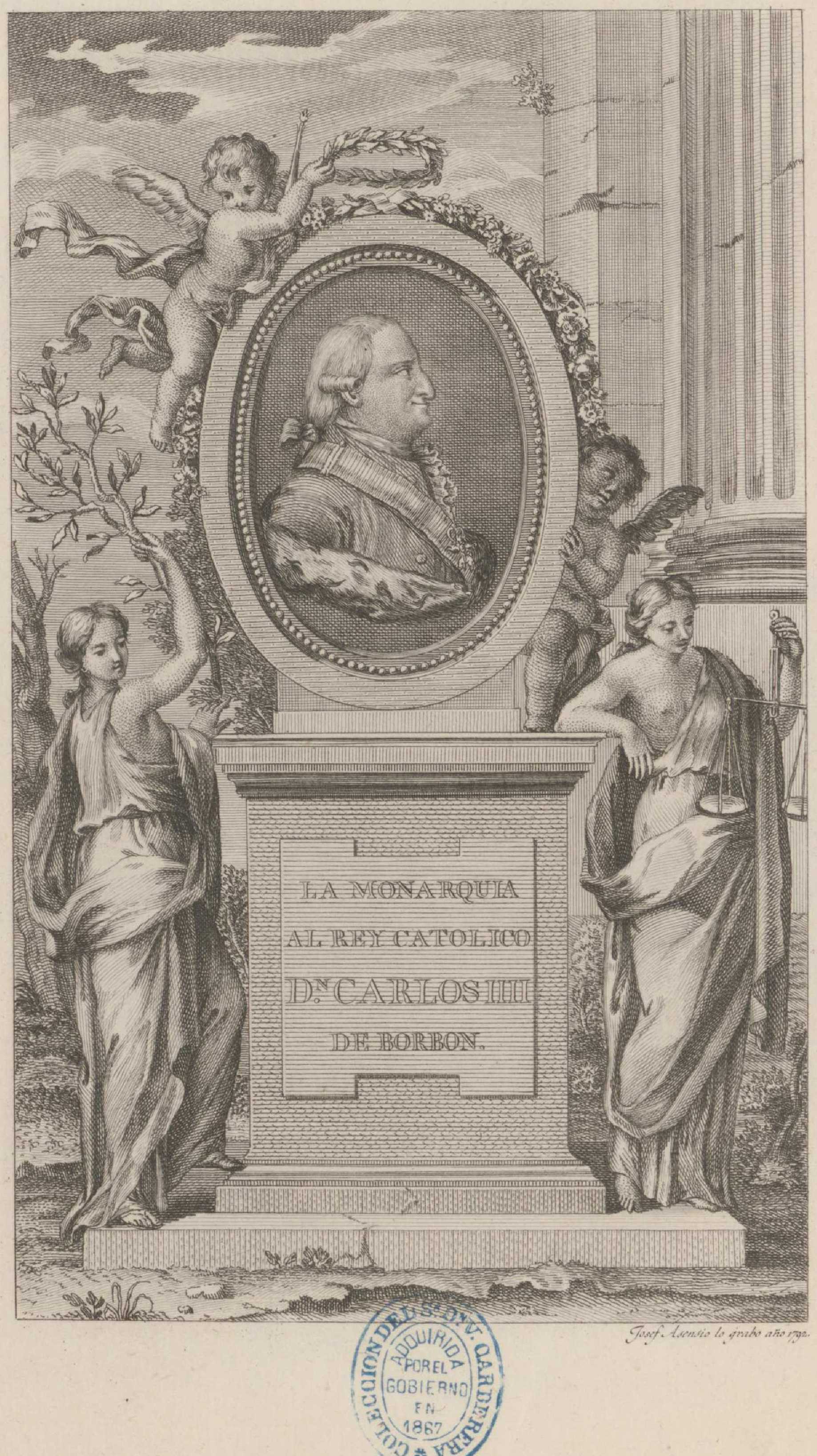 Josef Asensio: Retrato de Carlos IV, firmado Josef Asensio lo grabó año 1792. Inscripción: "La monarquía al rey católico D.n Carlos IIII de Borbón. Biblioteca Nacional de España